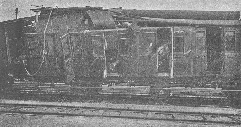 Zerstörter Personenwagen der PLM